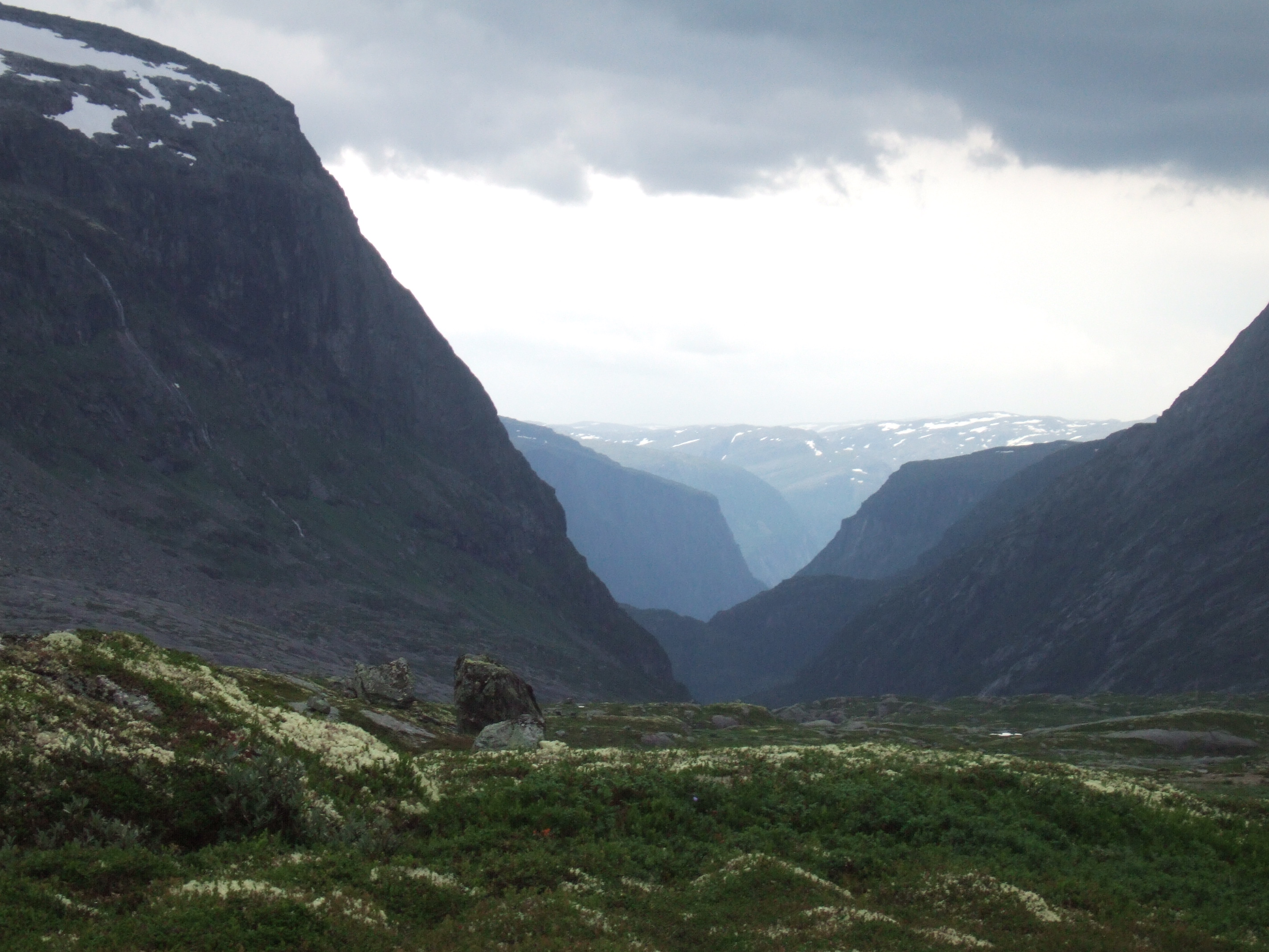 Fortunsdalen i det fjerne og Tverrdalslii nærmere. Utsyn fra Middalen.